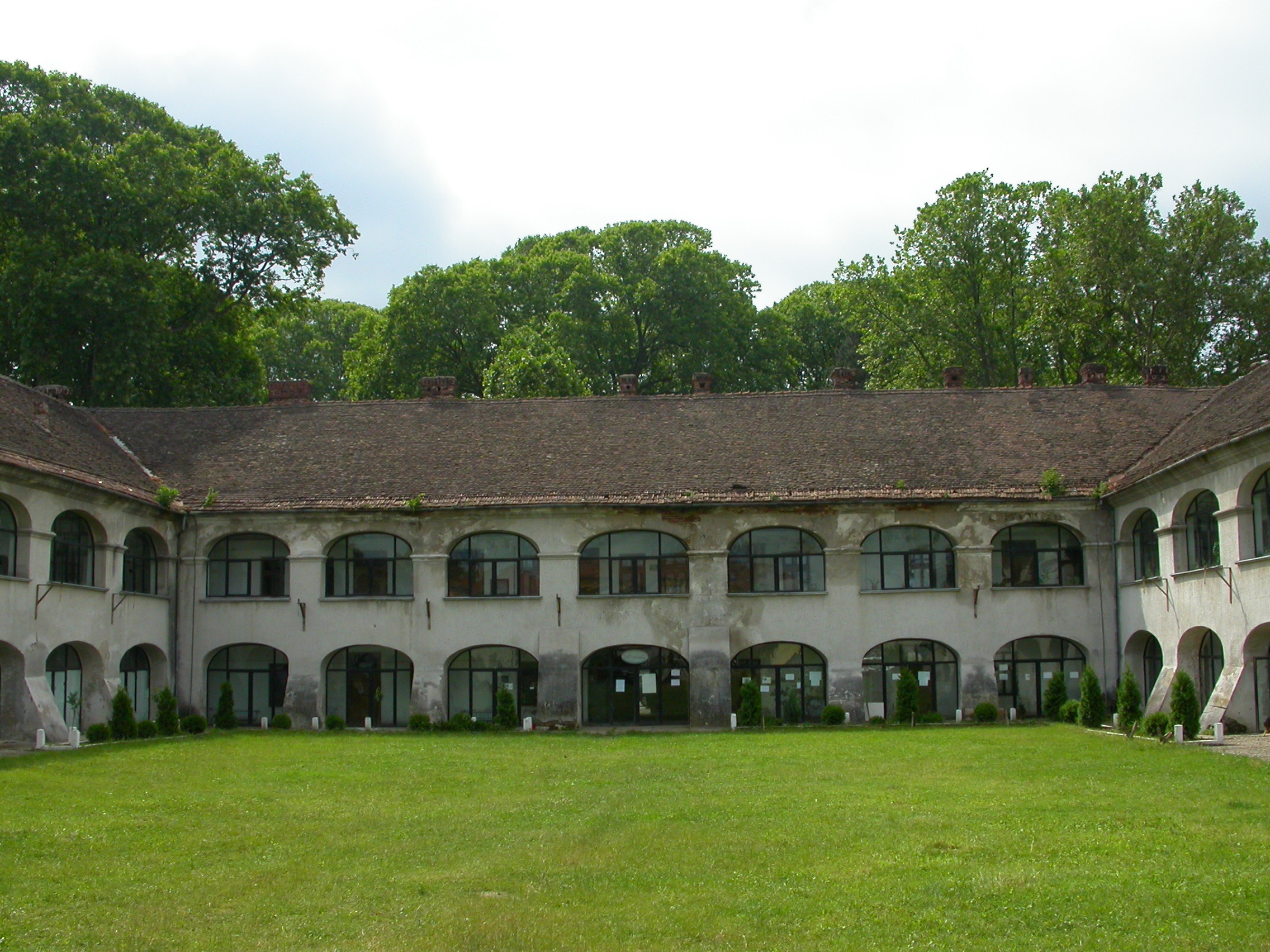 Cazarma grănicerilor, azi Muzeul Județean de Etnografie și al Regimentului de Graniță Caransebeș, 1739, renovat 1753